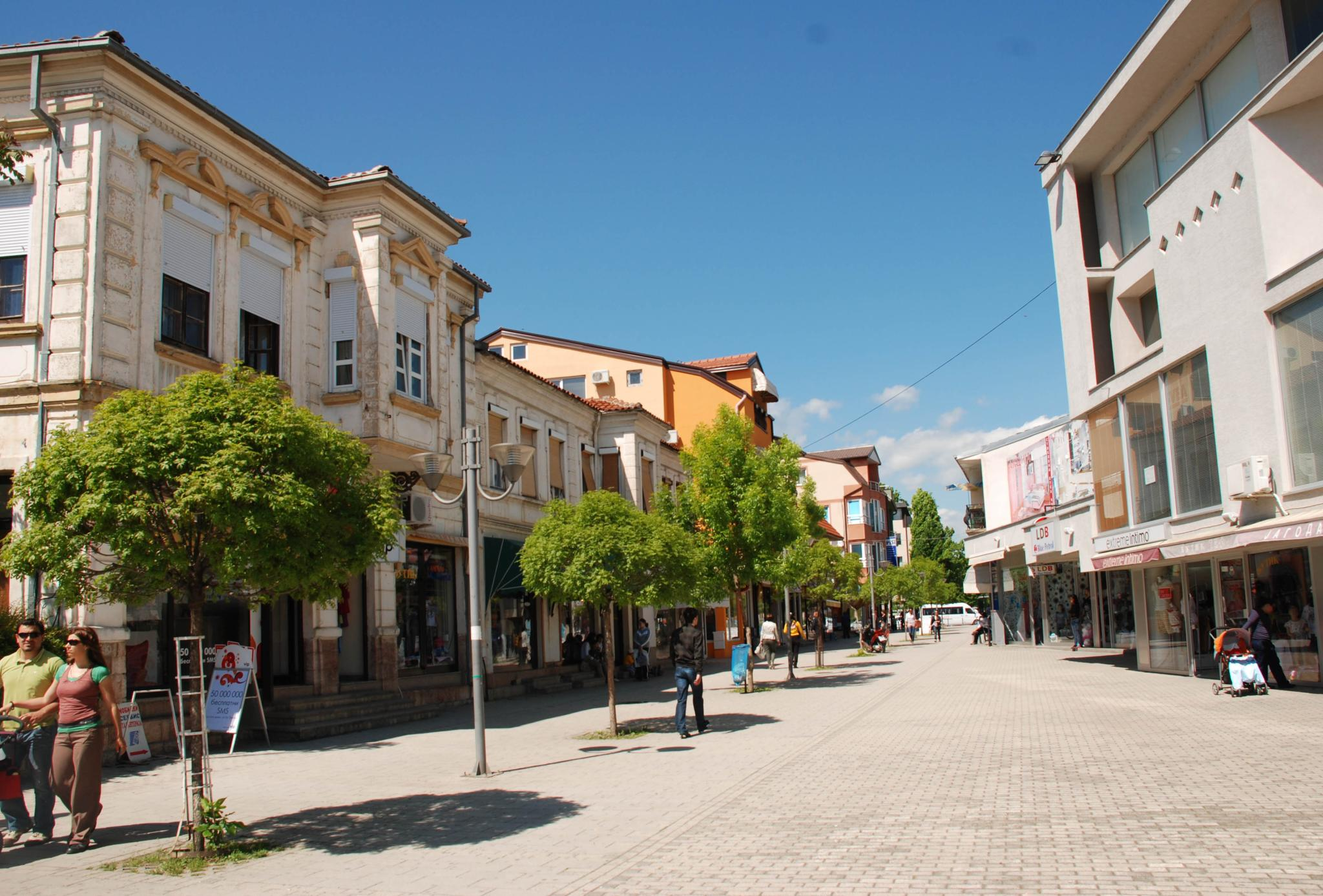 Ohrid Ohrid, Macedonia